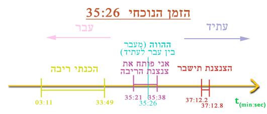 תמונה המסבירה פן מהערך he:הווה.